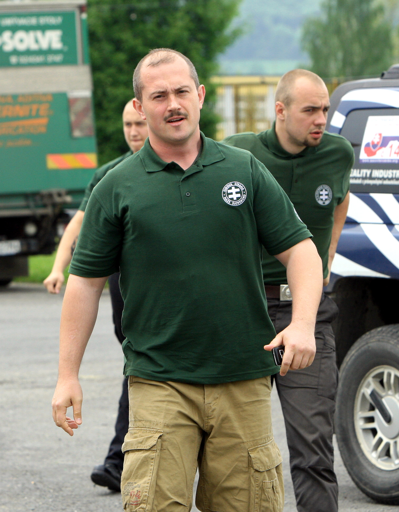 Marian Kotleba na mítingu Ľudová strana Naše Slovensko v Detve